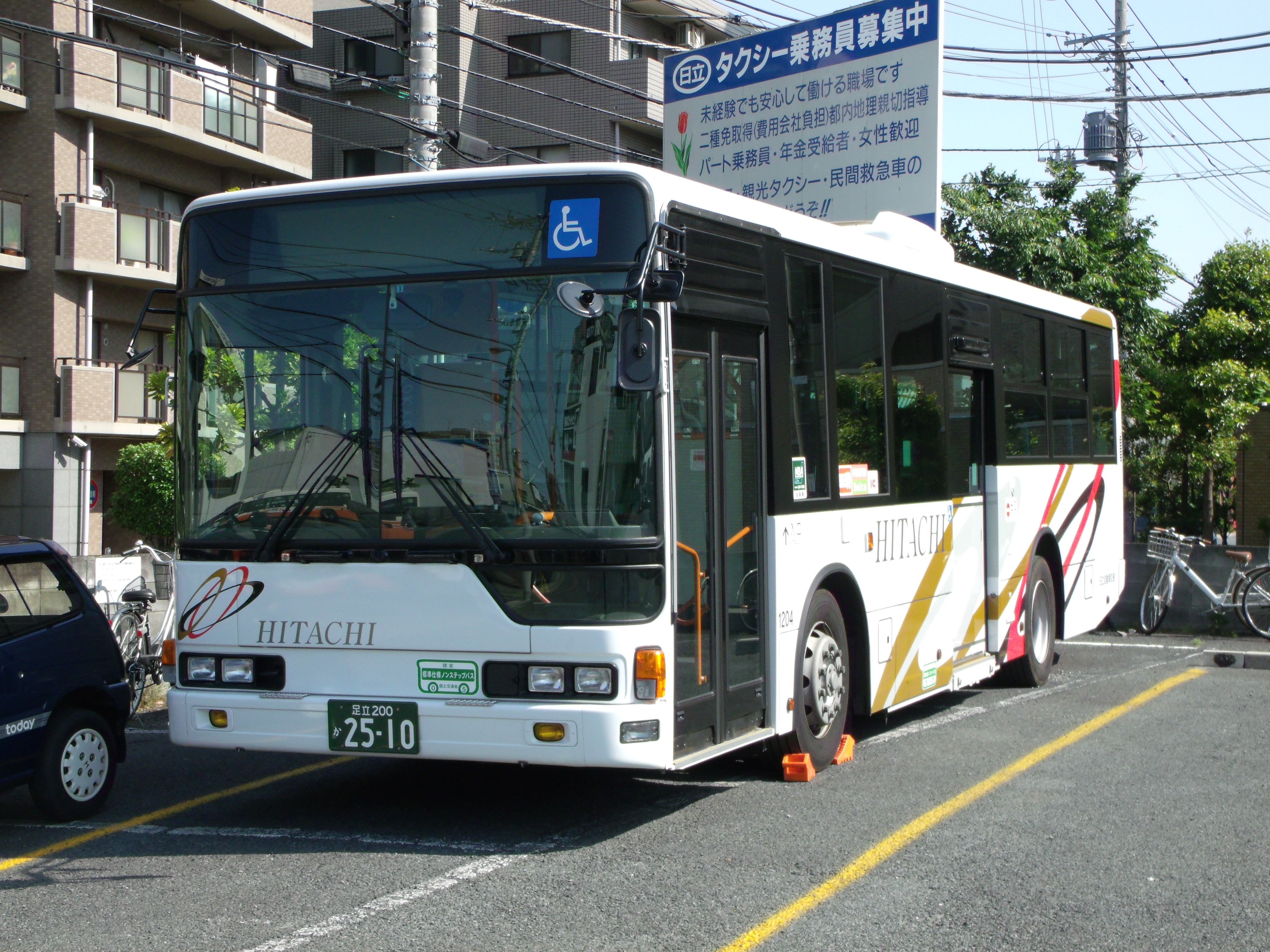 晴海ライナー専用車両（三菱・エアロスター）